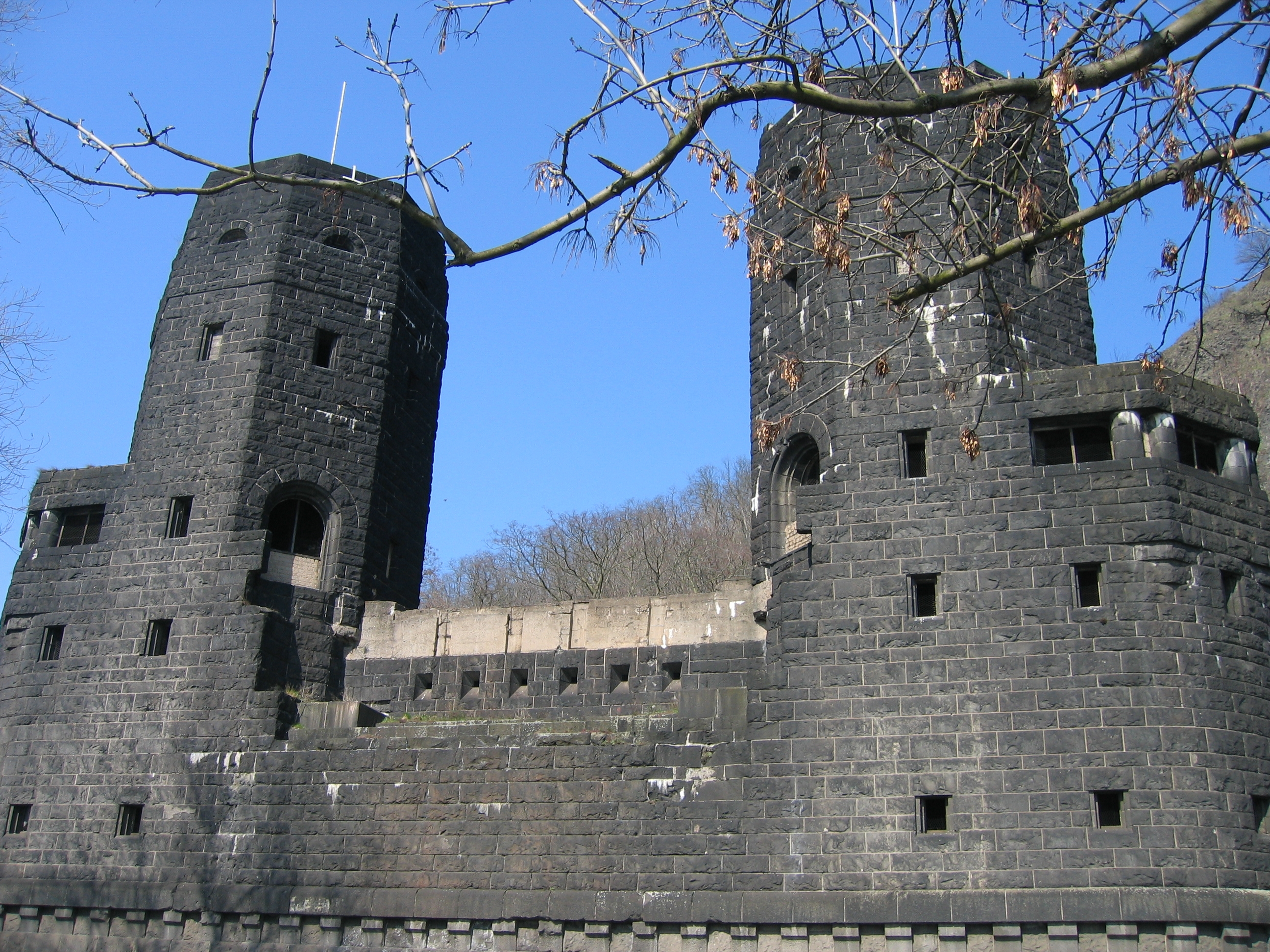 Ludendorffbrücke, ehem. Ostportal, Erpel